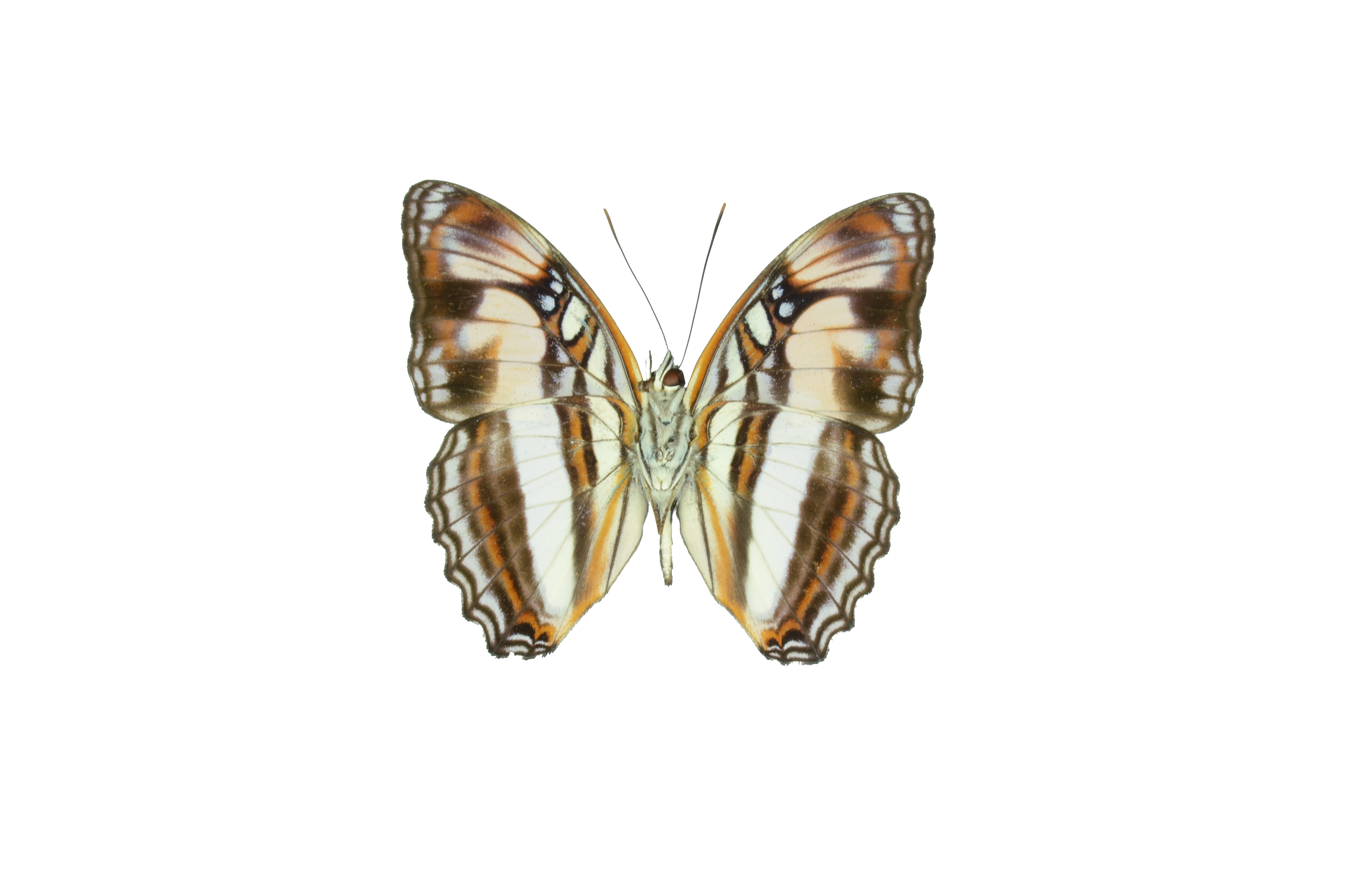 eastern Ecuador